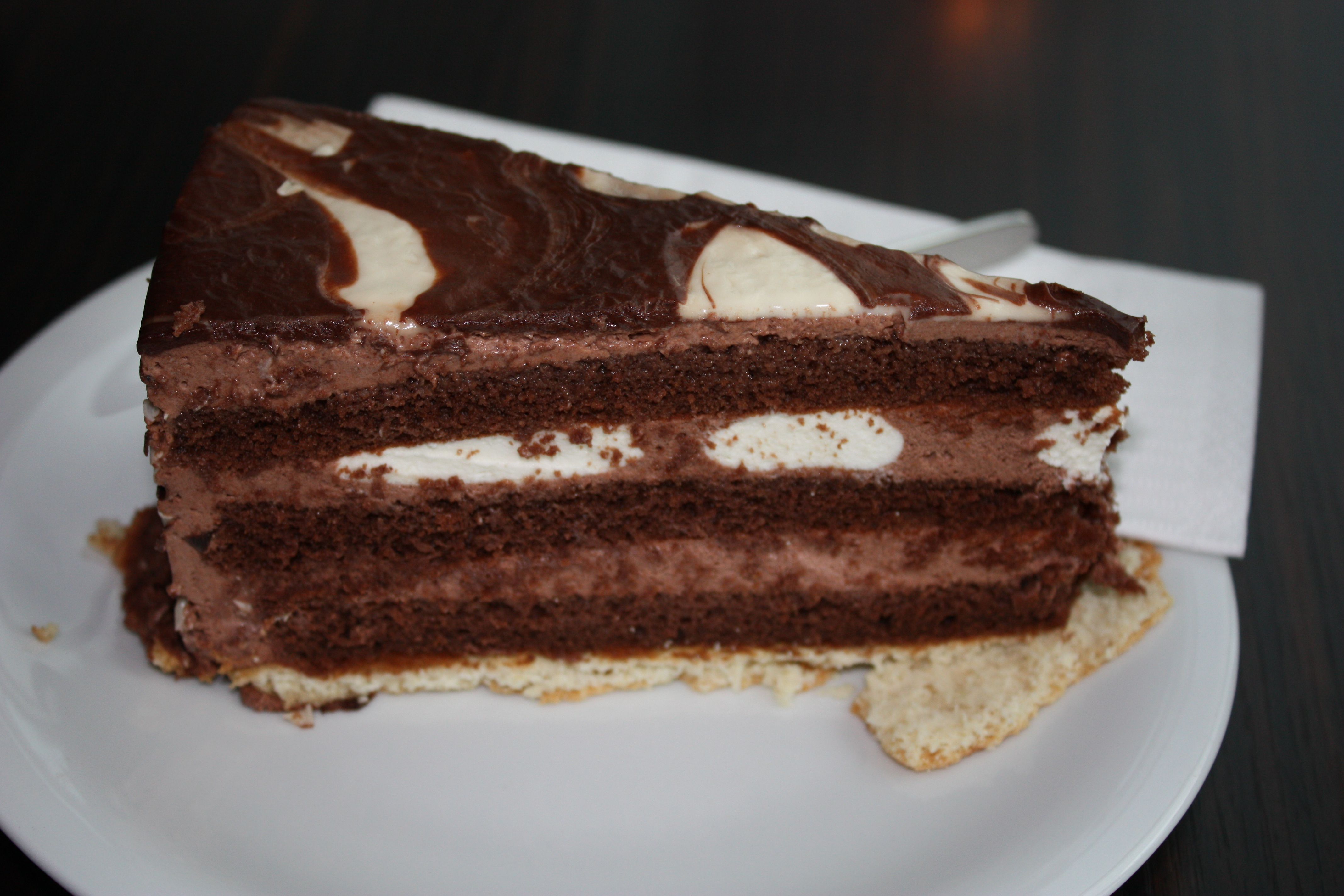 Köln, März 2009